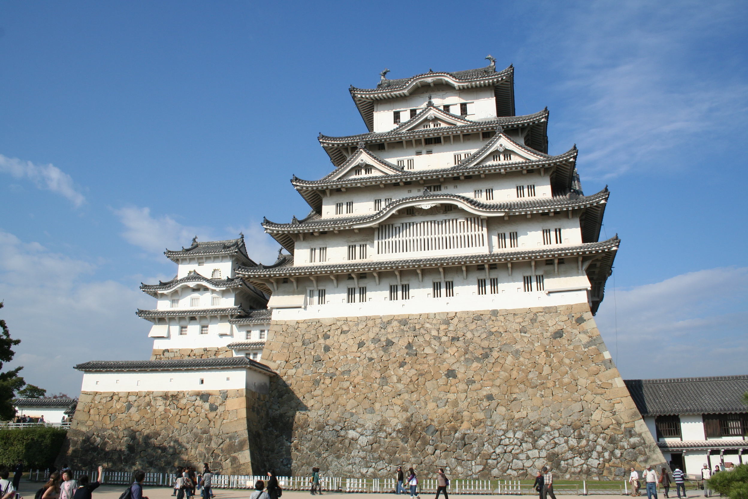 2009年秋の姫路城。 備前丸から見た天守閣。大天守の構造は石垣内部にある地下一階の部分とその上にある6階の部分で構成されている。